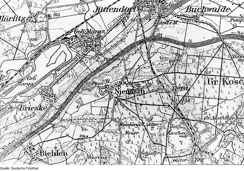 Original image description from the Deutsche Fotothek Senftenberg-Niemtsch. Reichskarte, 1:100.000, Einheitsblatt Nr. 89, 1922